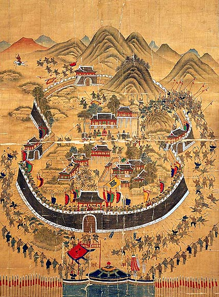 Оборона Тоннэ (1592)